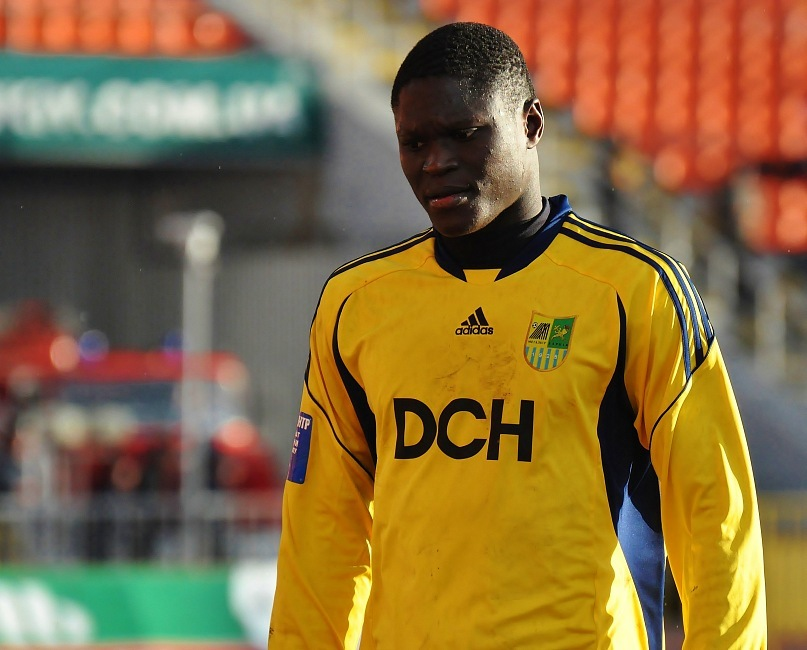 Папа Гуйе